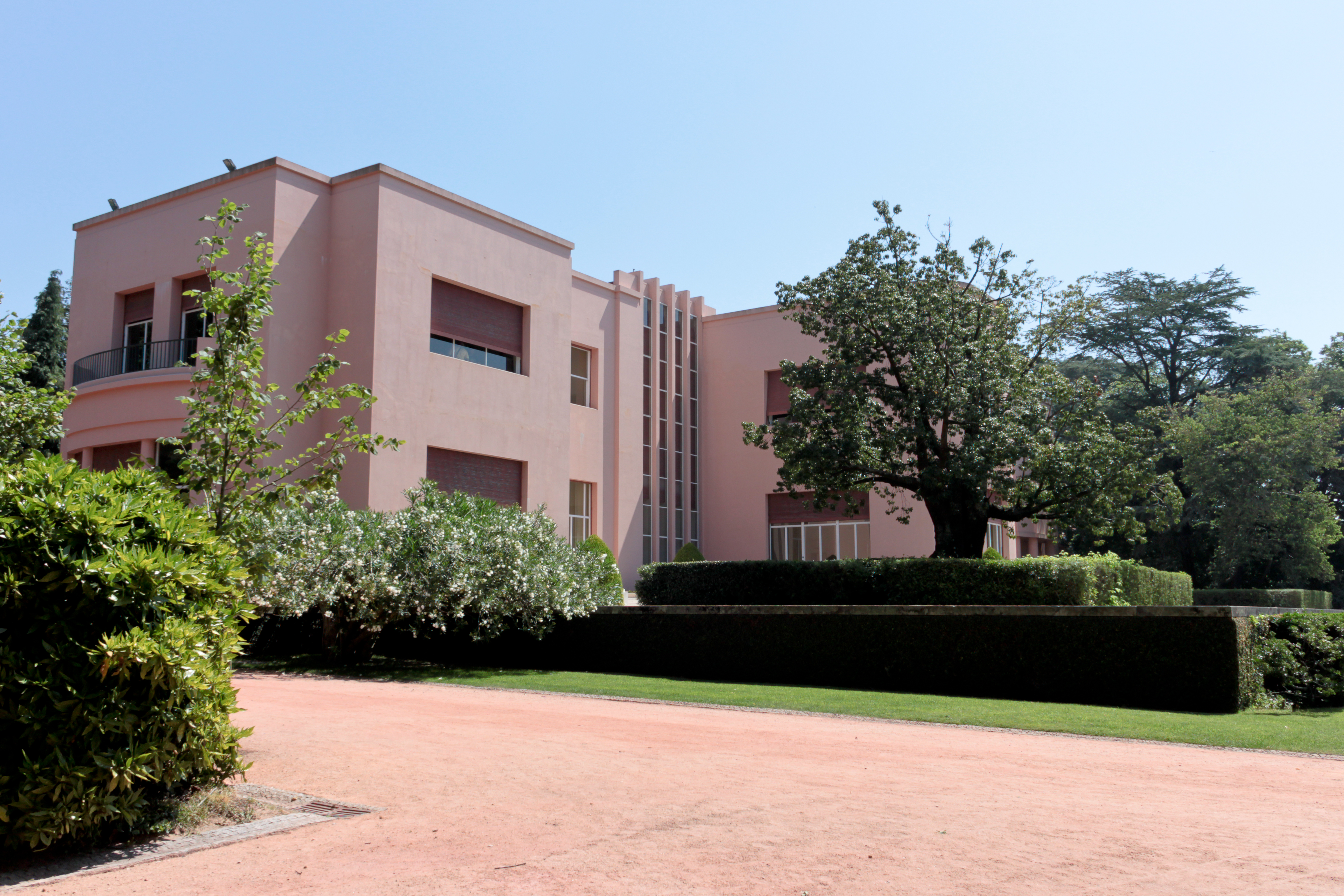 Casa Mandada construir pelo 2º Conde de Vizela - Carlos Alberto Cabral This file was uploaded for Wiki Loves Monuments in Portugal with the unique identifier 74212.